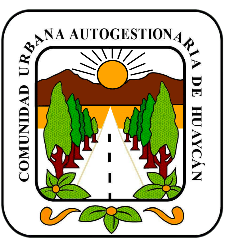 Escudo de bordes finos color negro, dentro del campo, se observa sol radiante, cerros, arboles, carretera y hojas de adornos.